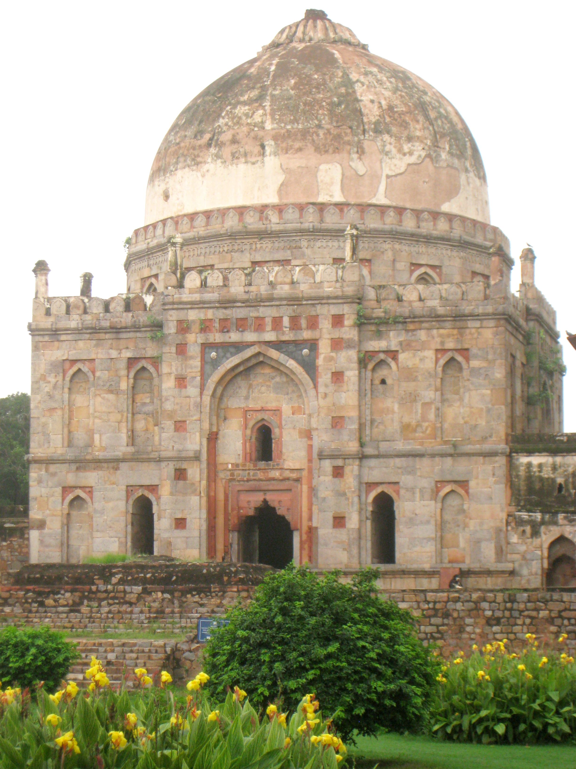 Bara Gumbad tomb, in Lodi Gardens at dawn, New Delhi, India.